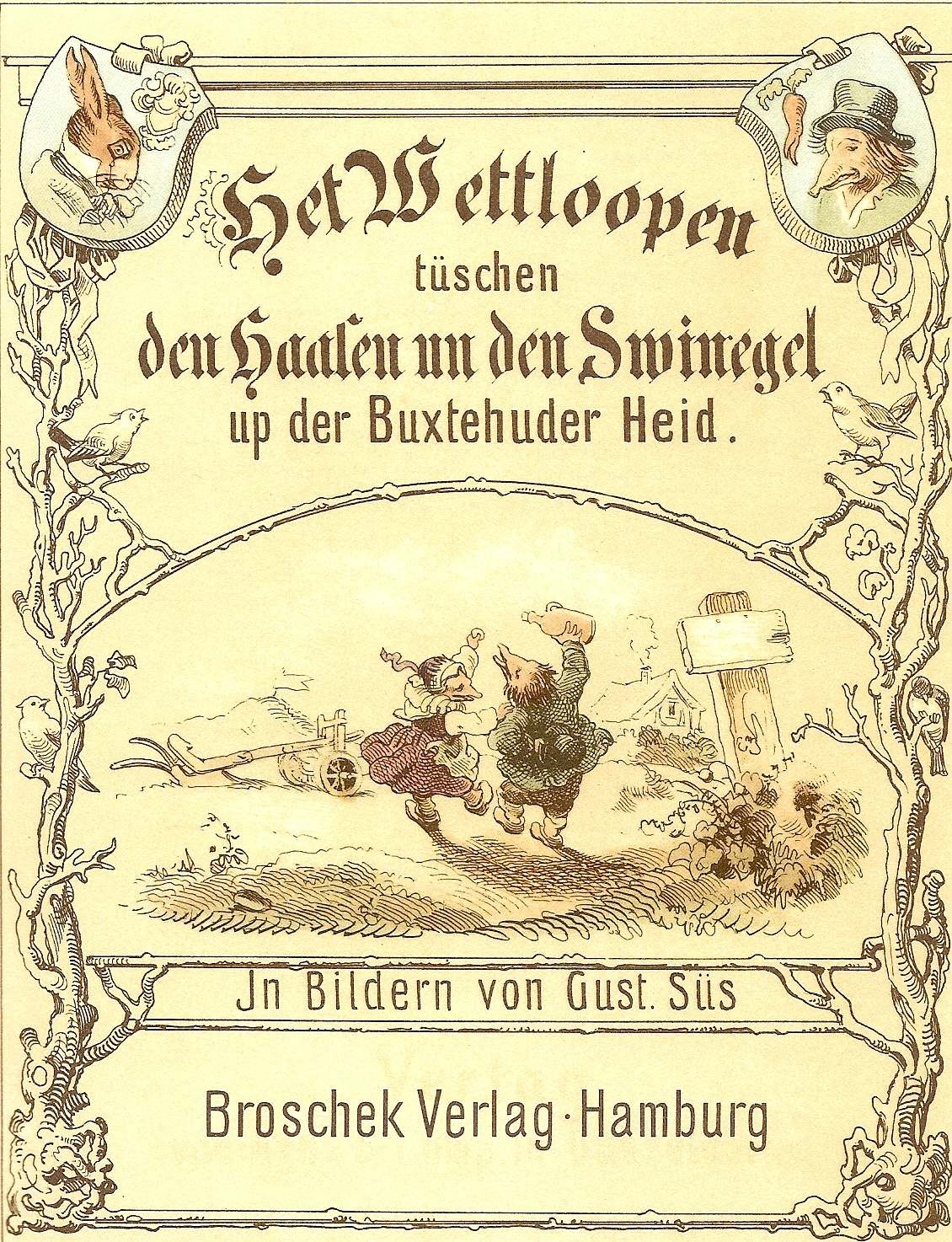 Titelblatt des 1855 erschienenen Buches mit den Lithographien von Gustav Süs